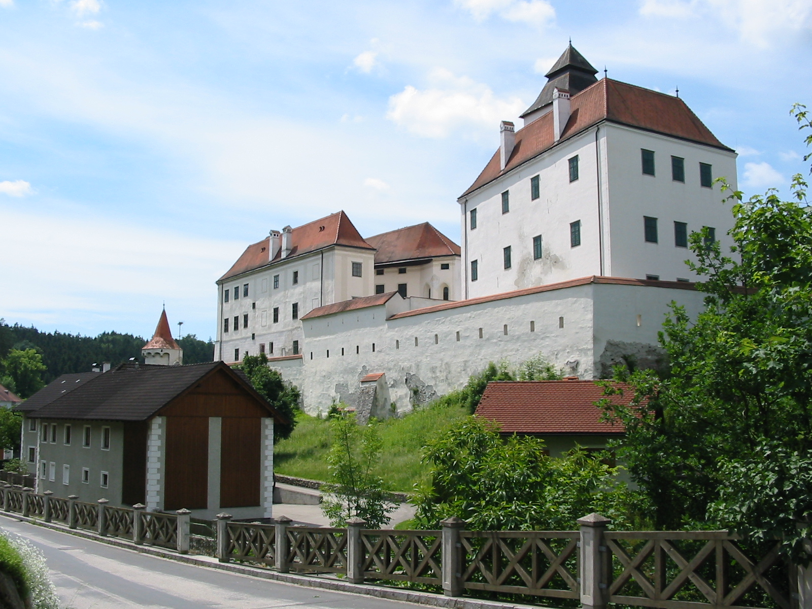 Nordöstliche Seite von Schloss Seisenegg.